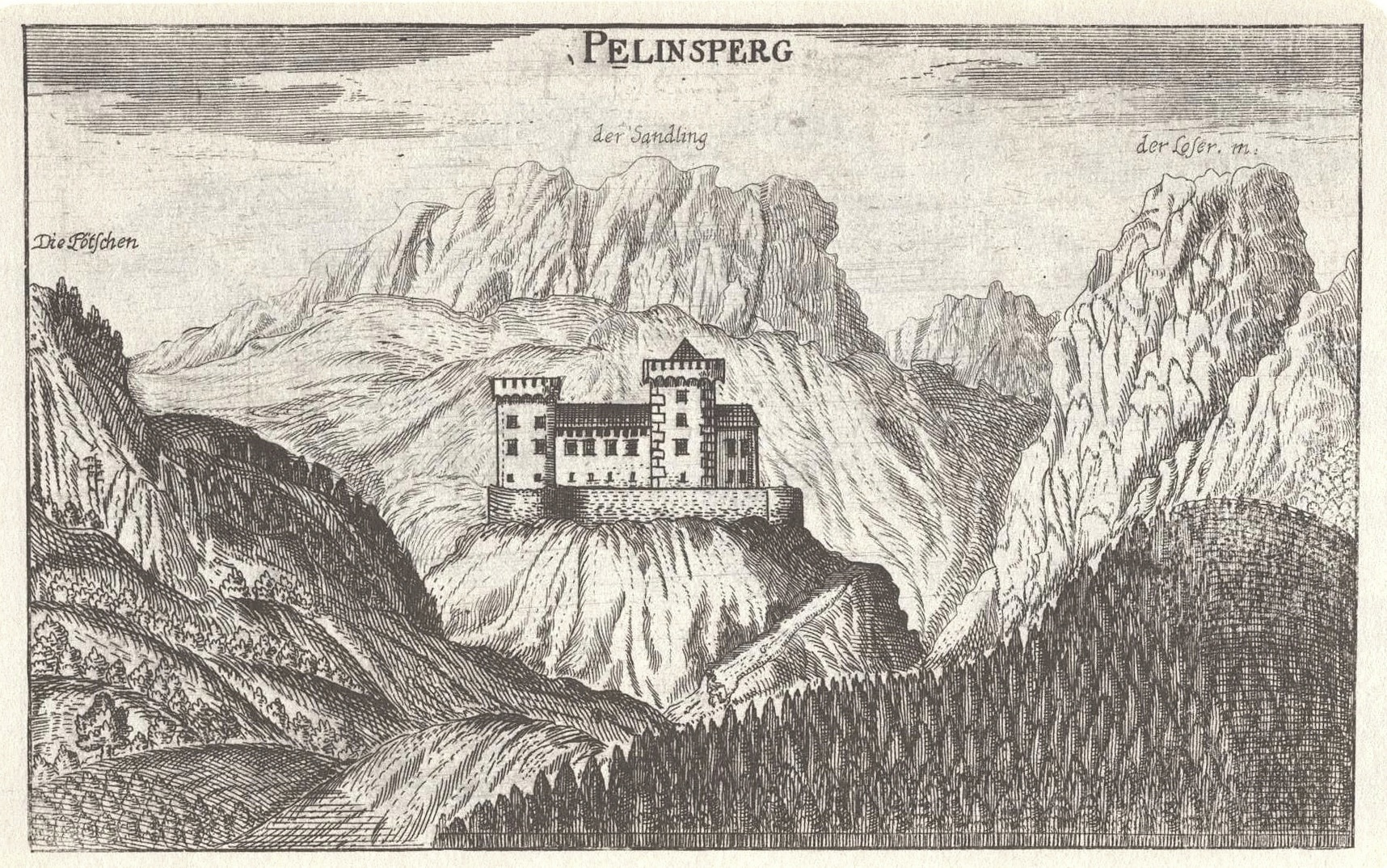 Stich der Burg Pflindsberg in Altaussee von Georg Matthäus Vischer (Topographia Ducatus Stiriae), Jahr 1681